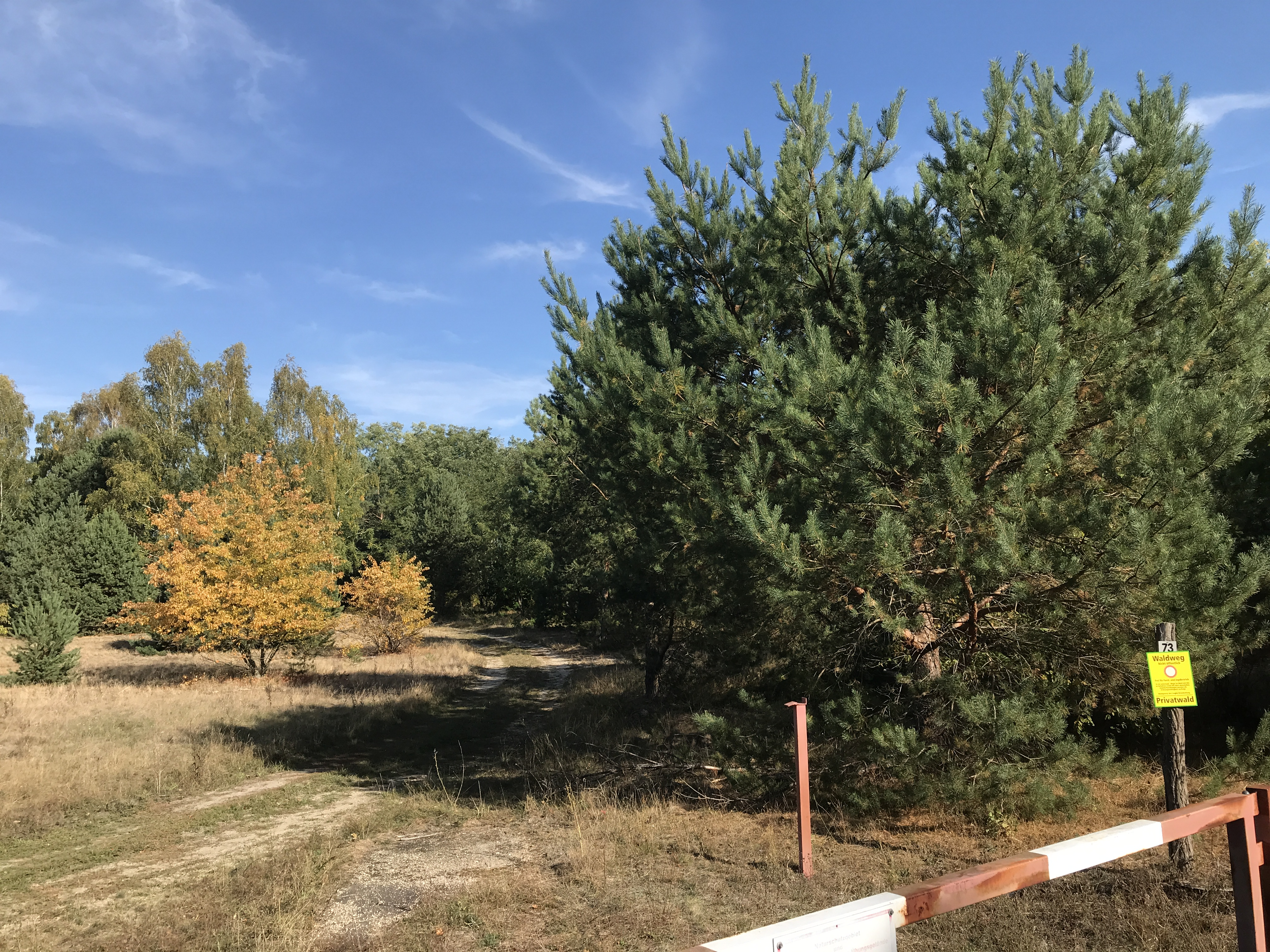 Naturschutzgebiet Jägersberg-Schirknitzberg bei Zossen im Land Brandenburg